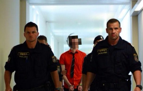 Der Jenaer Student Josef S. im Wiener Landesgericht.